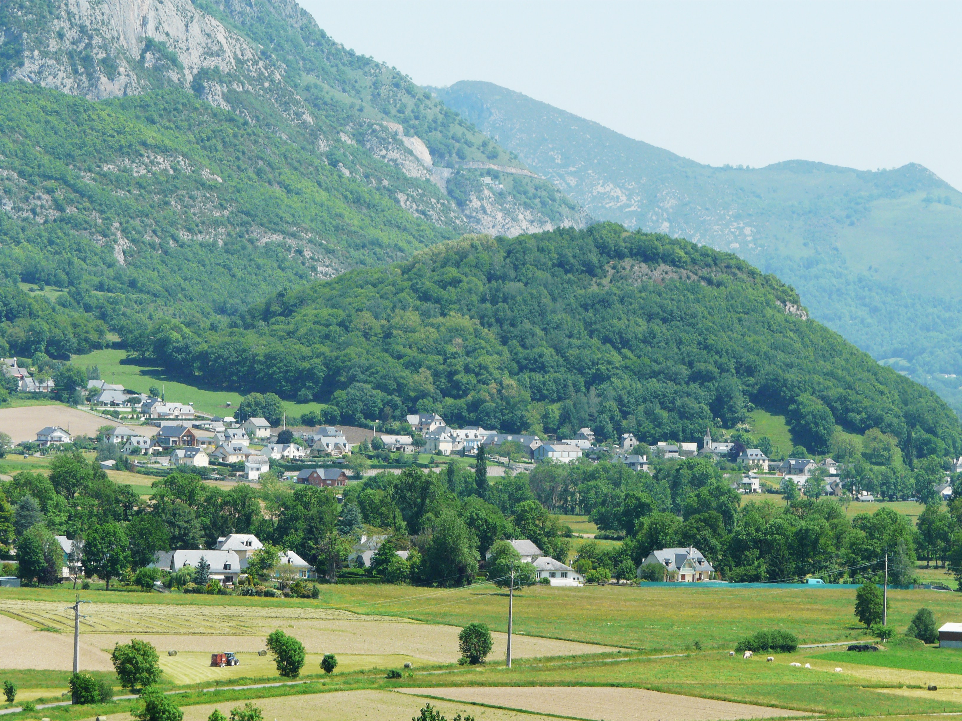 Le village de Vidalos, Agos-Vidalos, Hautes-Pyrénées, France.